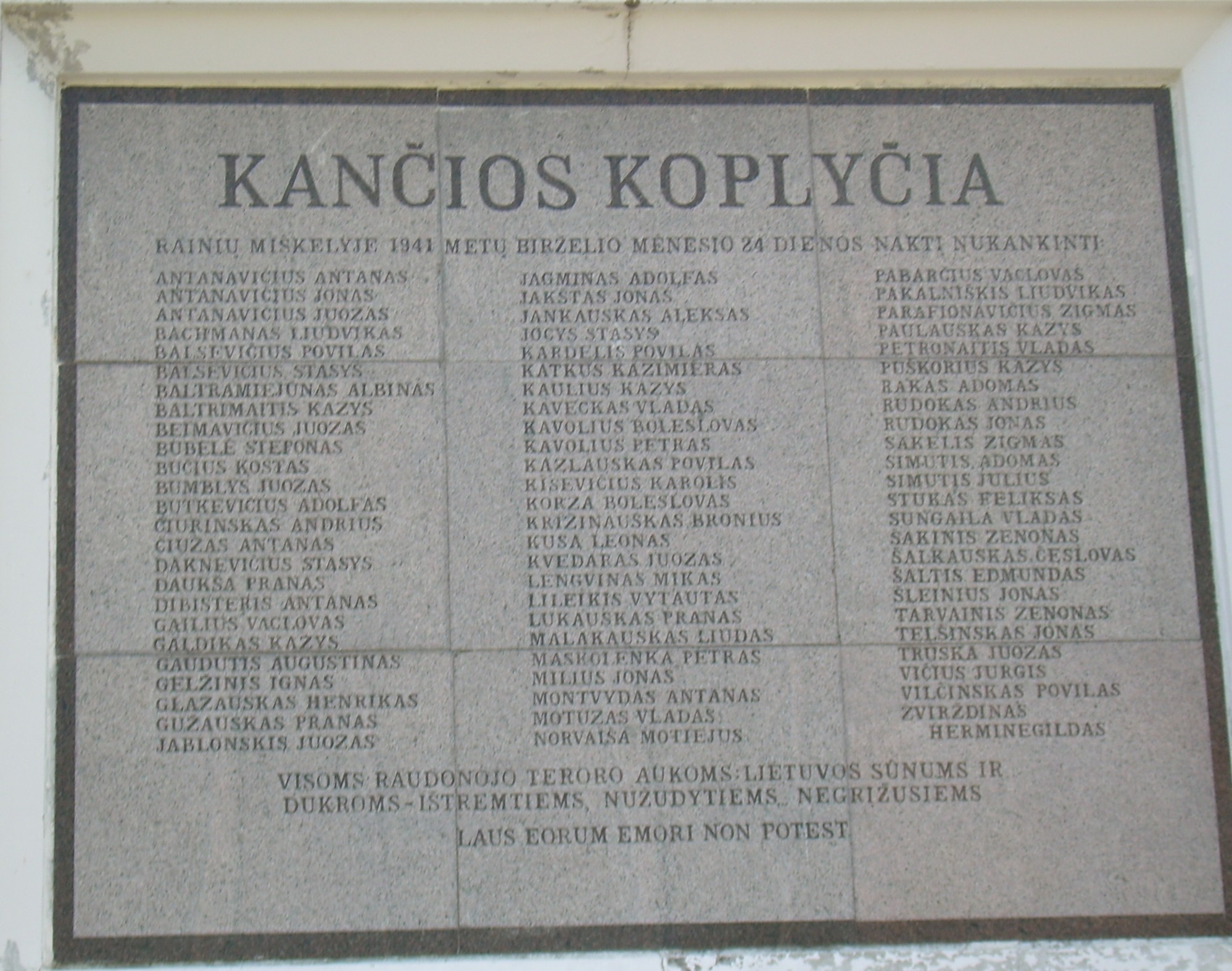 Rainių koplyčia